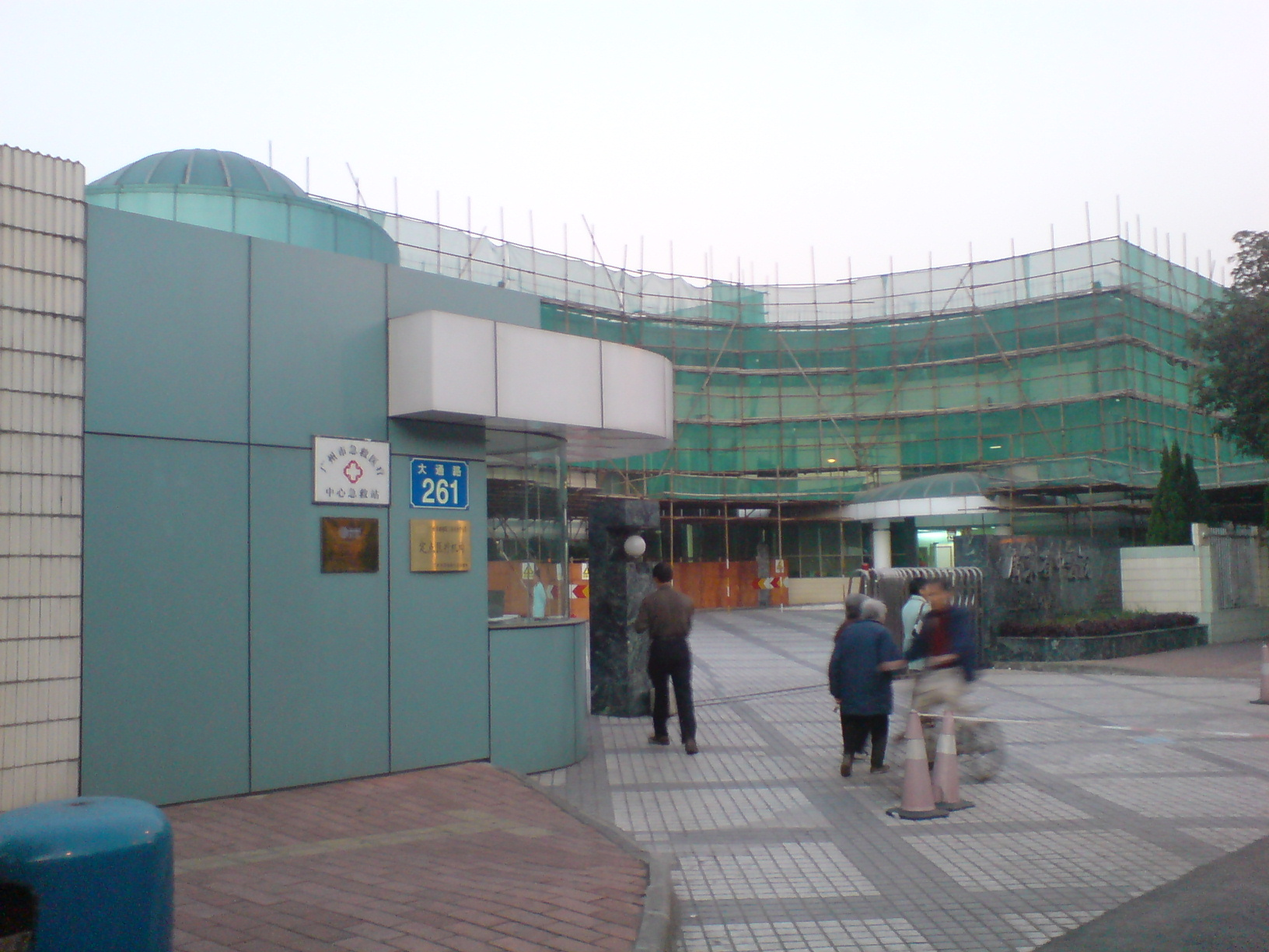 广东省中医院二沙岛分院